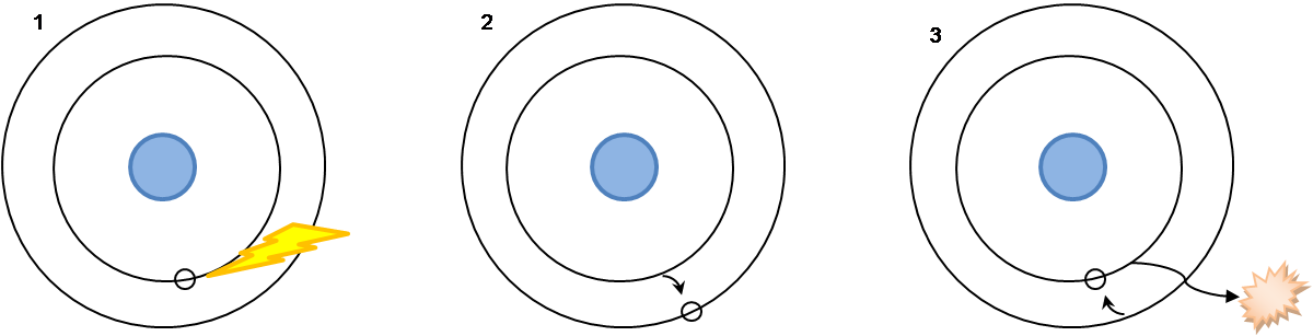 Princípio da emissão fluorescência: O electrão de umátomo ao ser excitado, orbita para um nível energético superior e ao retomar o nível energético de repouso emite um fotão